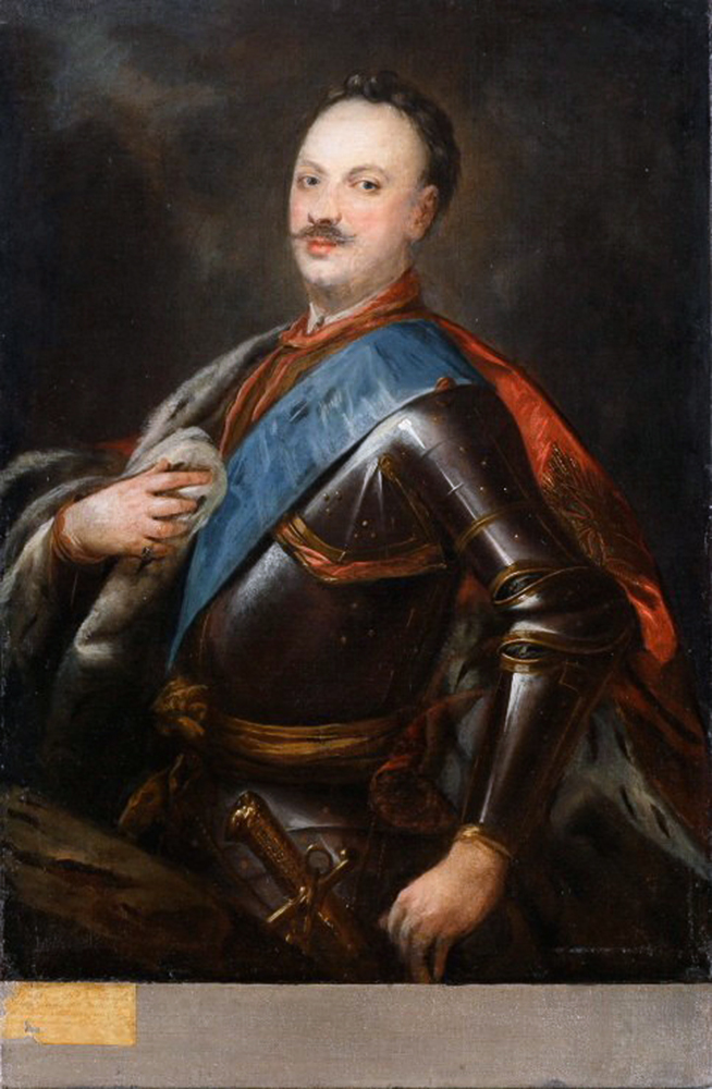 Беларуская (тарашкевіца): Партрэт Ігнація Сапегі (Ihnaci Sapieha)